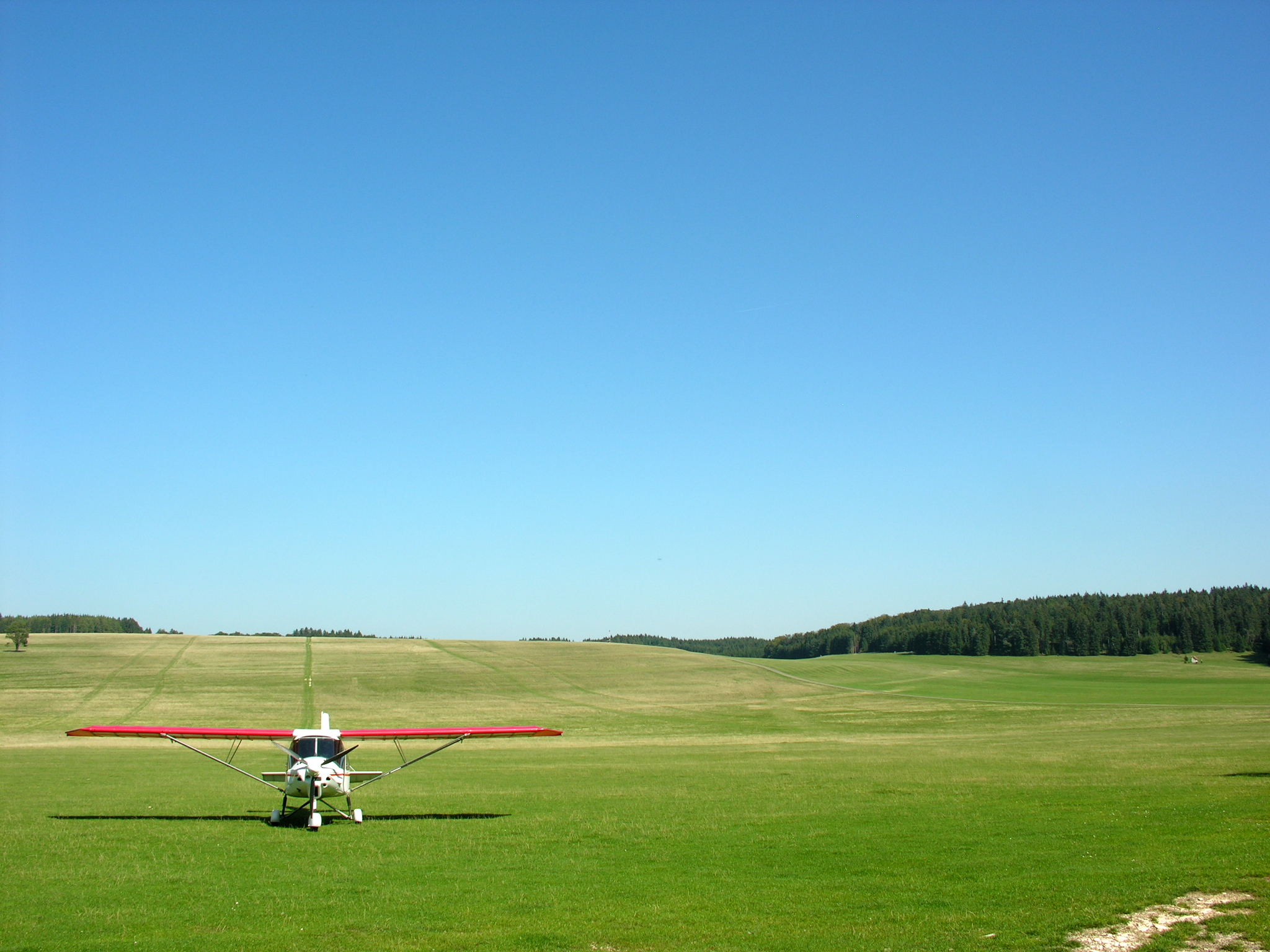 Germany, Baden-Württemberg, Klippeneck airfield